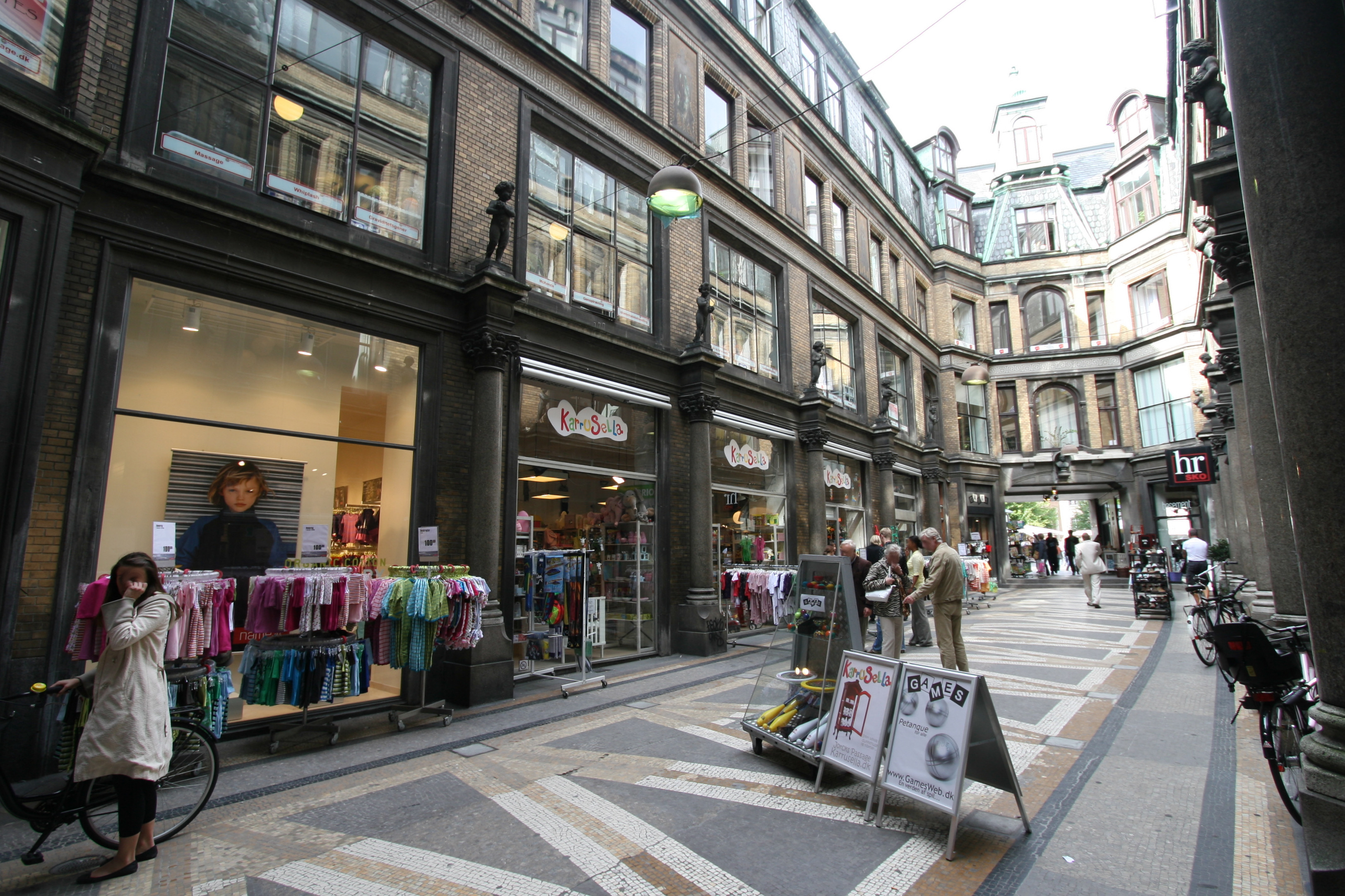 Jorcks Passage in Copenhagen. Seen from the Vimmelskaftet end.